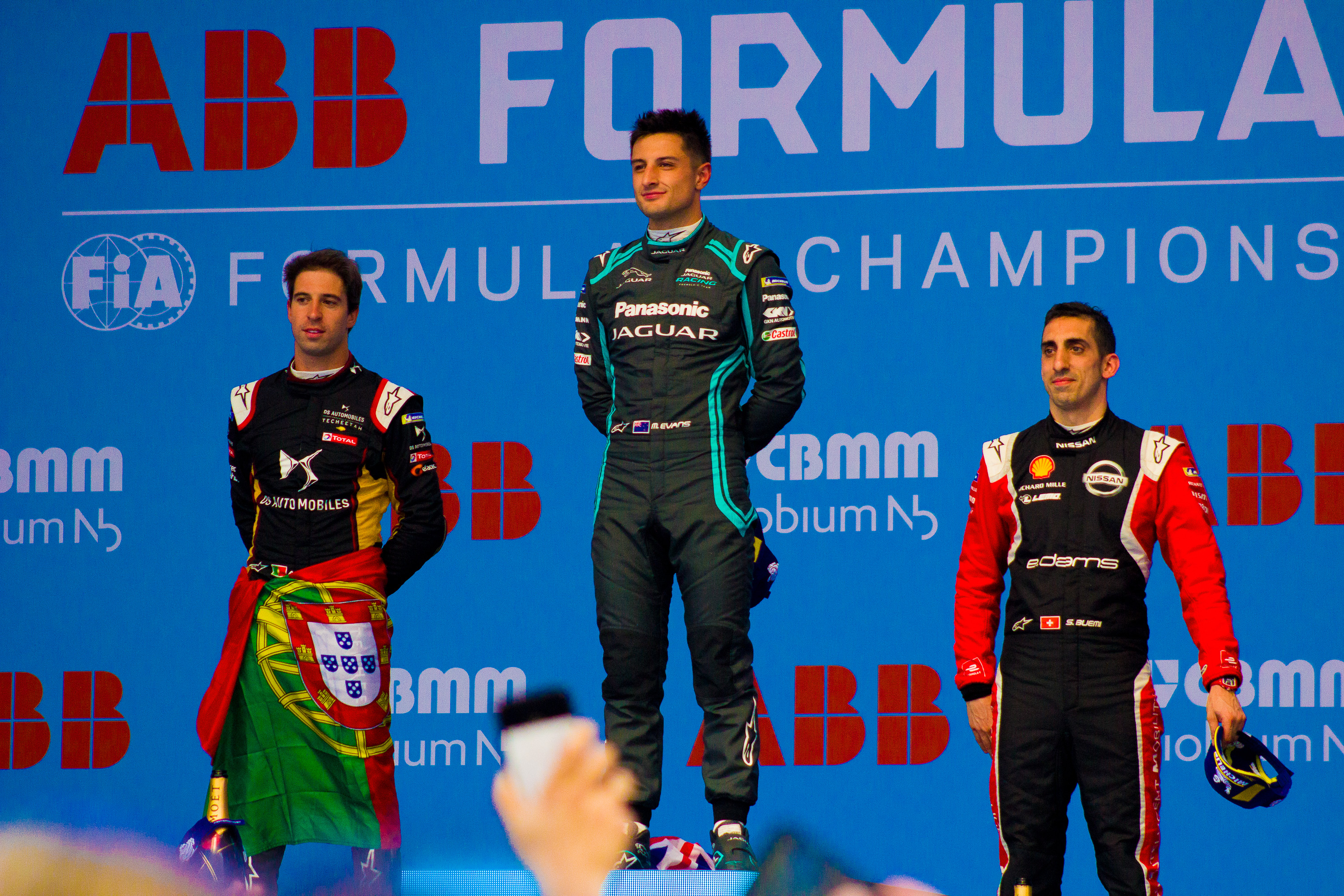 2019-20 FIA Formula E, CBMM Niobium Mexico City E-Prix 2020, Autódromo Hermanos Rodríguez, Ciudad de México, 15 de febrero 2020